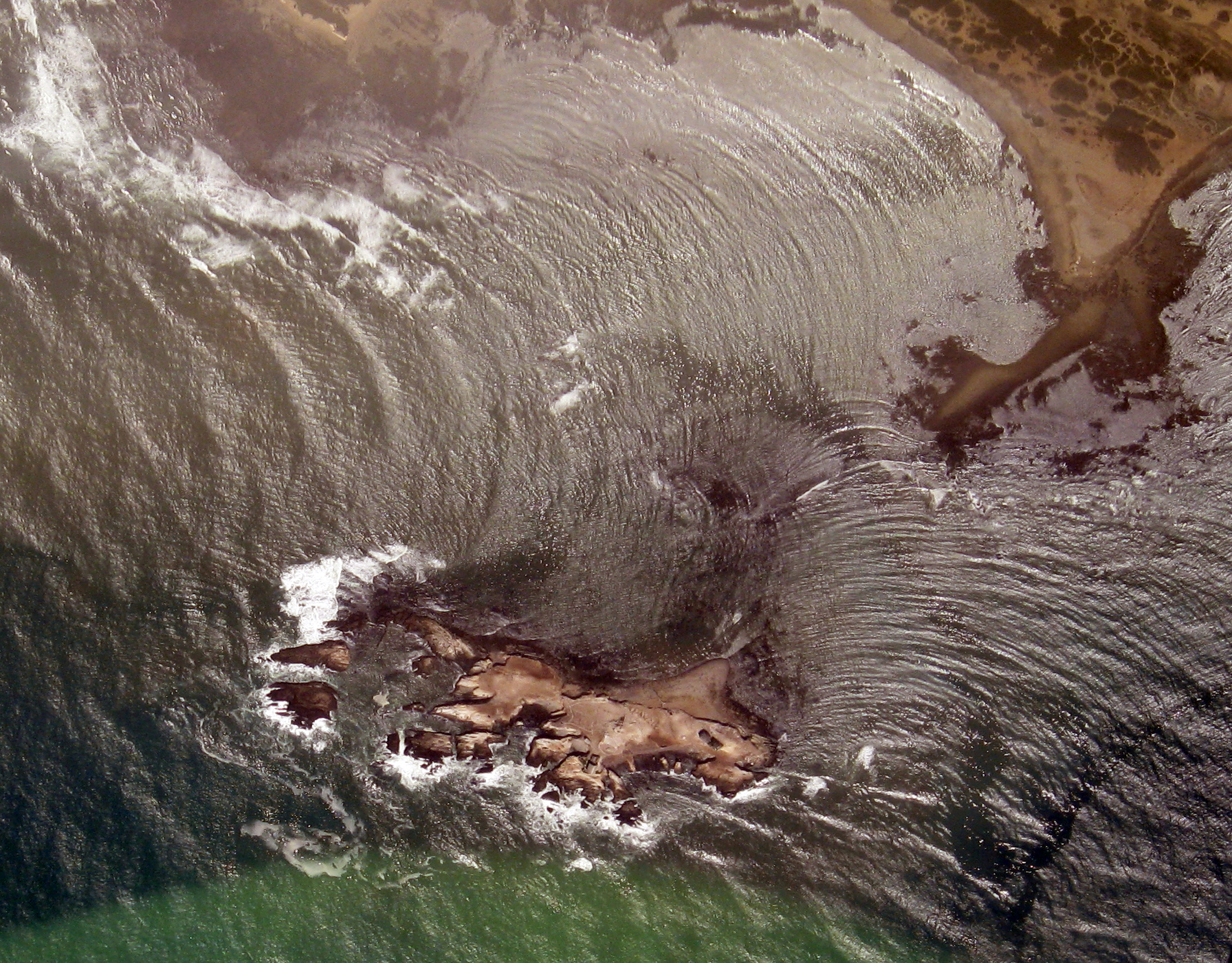 Año Nuevo Island, off Año Nuevo Point.